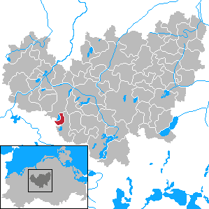 Klein Upahl in Mecklenburg-Vorpommern - District Güstrow